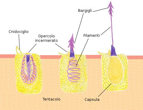 Meccanismo di azione di una cellula nematocisti.